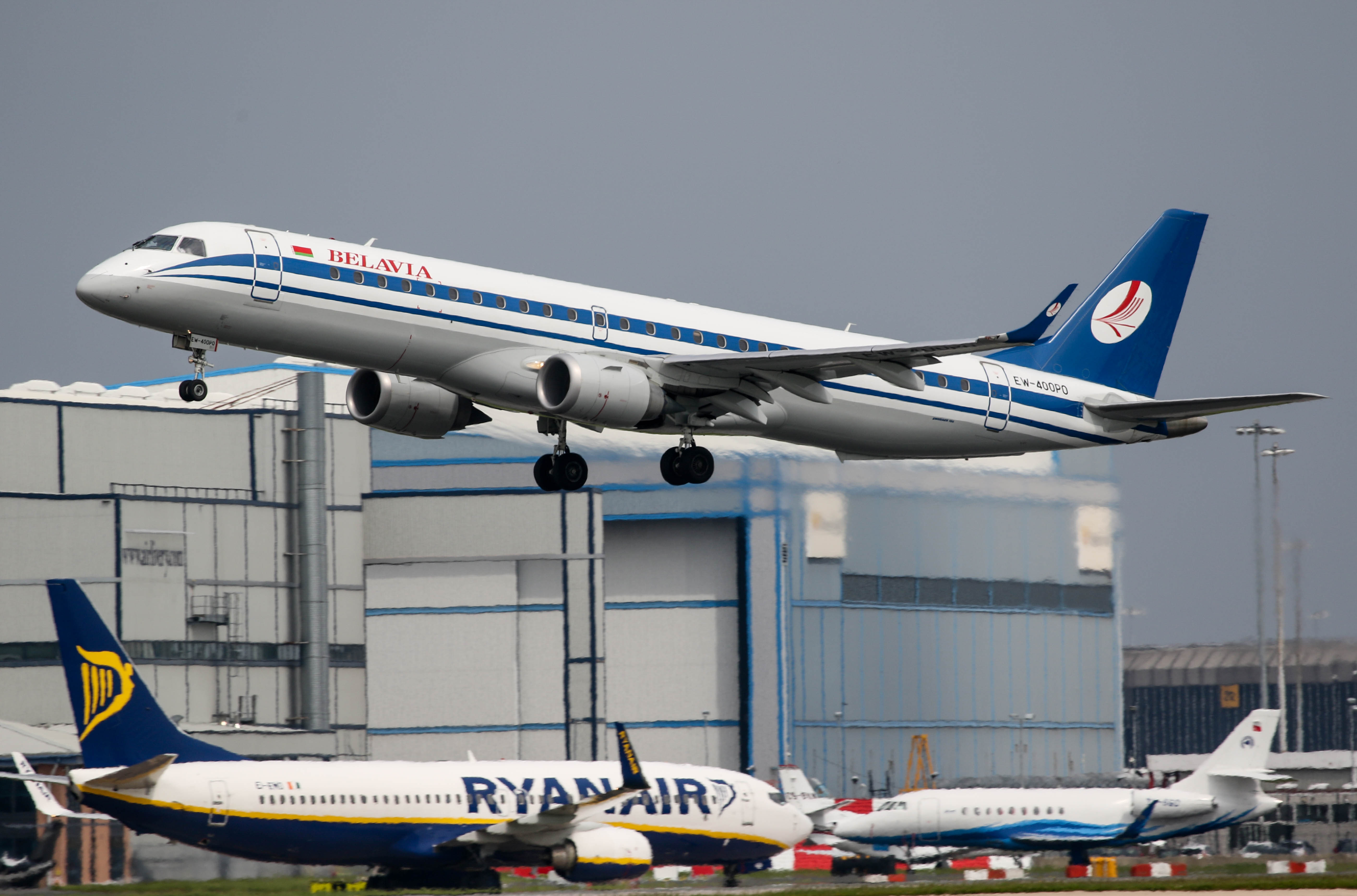 Belavia Embraer E190 EW-400PO